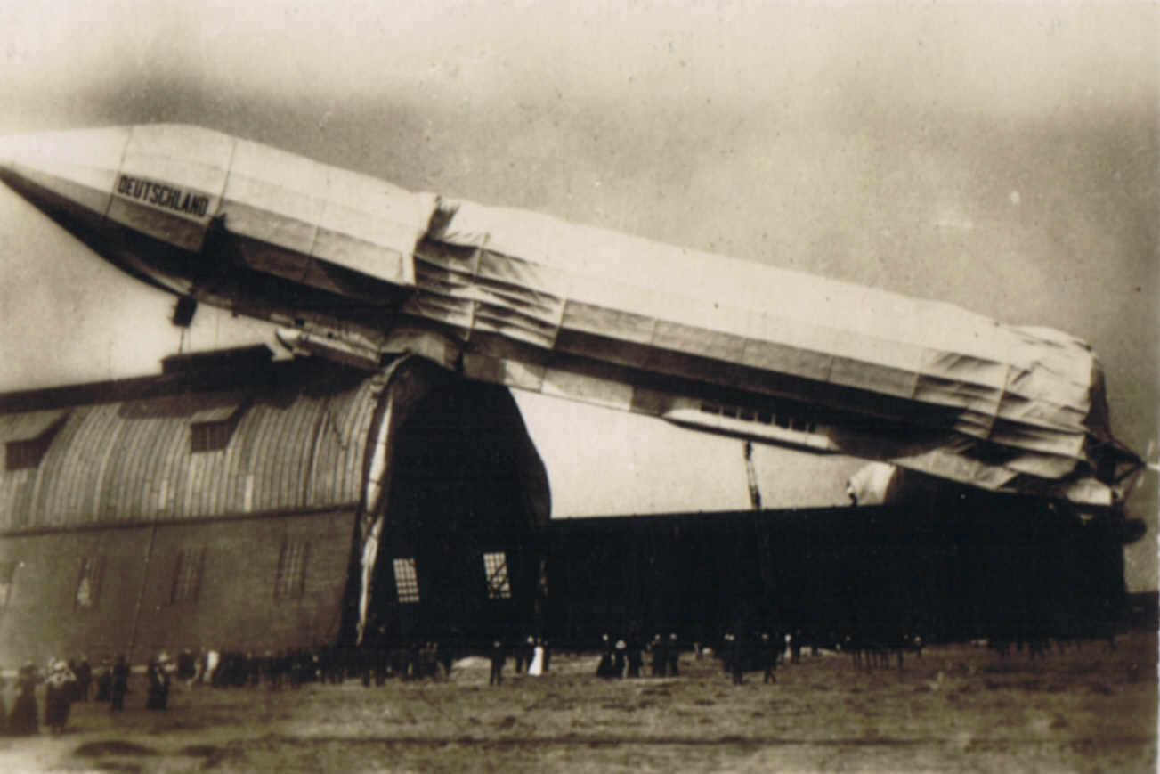 LZ 8 Deutschland II nach dem Absturz